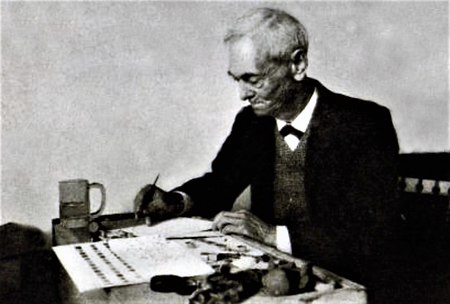 Charles Horton Peck (1833-1917) beim Zeichnen von Pilzen, um 1910